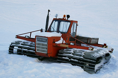 Eine alte "Ratrac"-Pistenraupe auf der Grimmialp in der Schweiz.